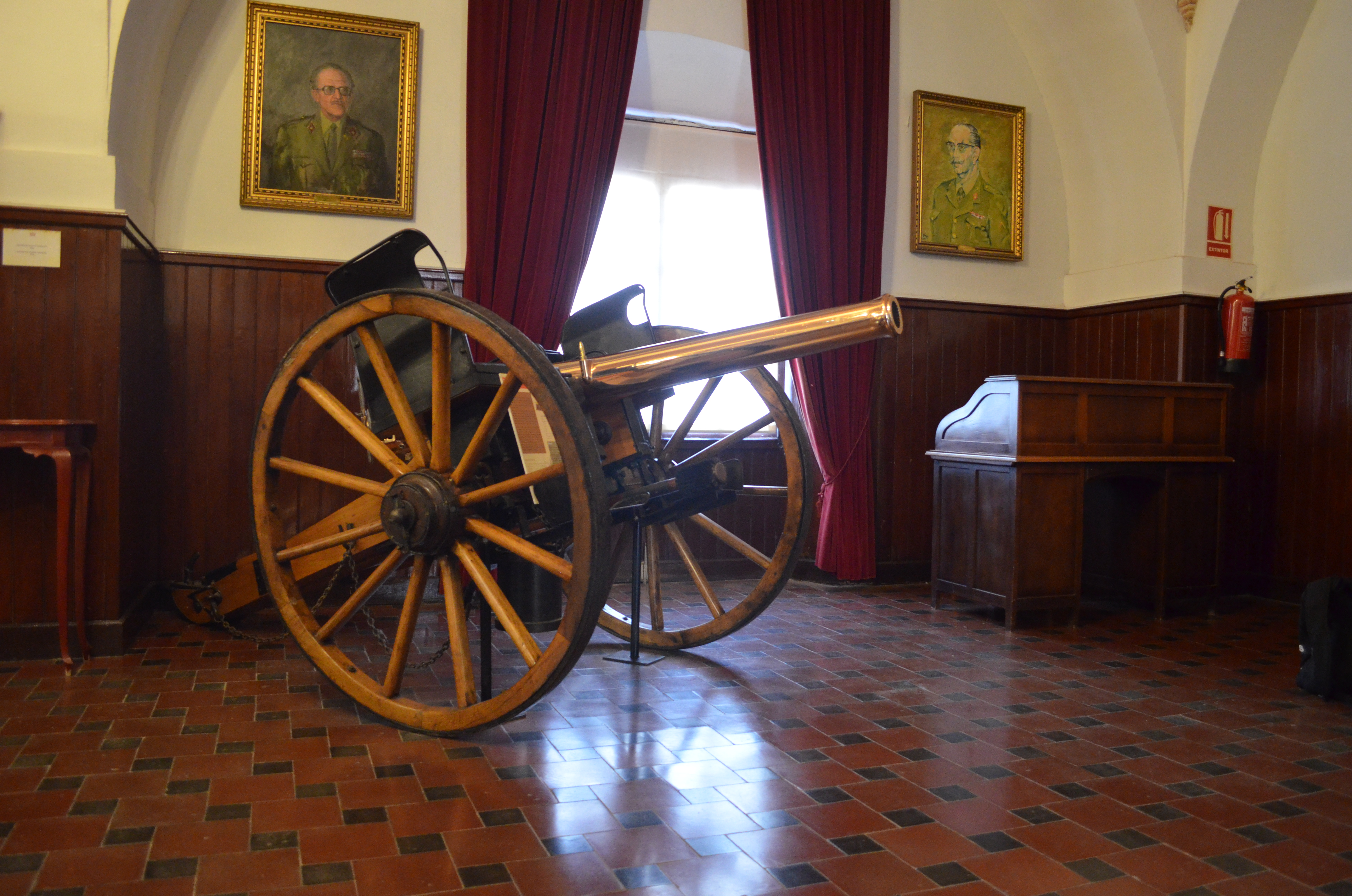 Cañón de 80mm. modelo 1886